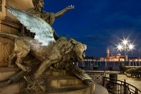 Jan Pohribný, fotografické dílo